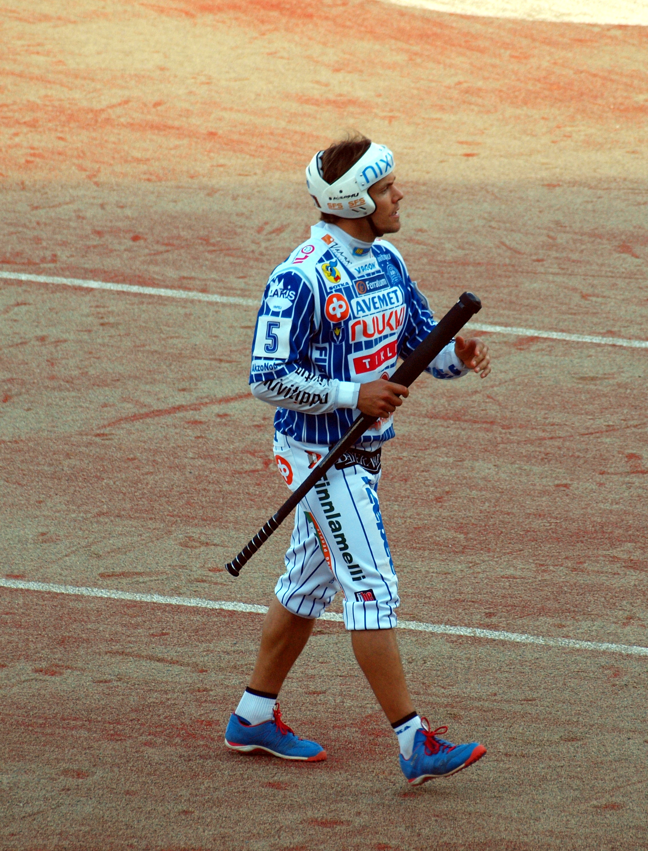 Alajärven Ankkurit - Vimpelin Veto pesäpallo-ottelu 10.8.2014. Kuvassa Antti Kuusisto.